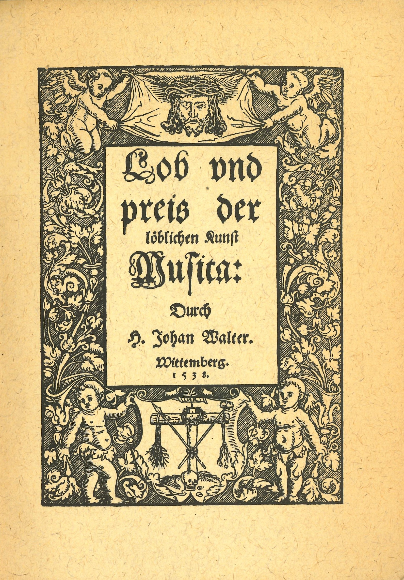 Titelblatt der Publikation von Johann Walter "Lob und Preis der löblichen Kunst Musica" von 1538. Achtung: Der vorliegende Scan wurde nicht anhand des Originals, sondern der Faksimile-Ausgabe von 1938 angefertigt. Im Originaldruck waren die Zeilen 1, 2, 4 und 6 rot gefärbt.